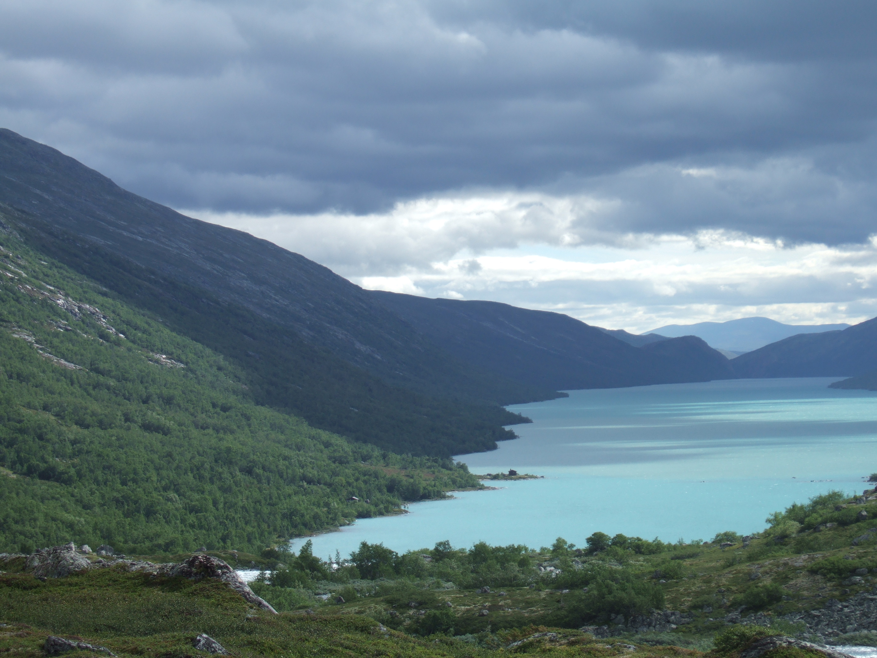 Rauddalsvatnet is a lake in Skjåk municipality in Oppland. It is a reservoir for Framruste power plants.